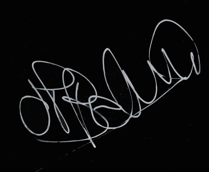 Dédicace de Jean-Paul Belmondo en Aout 2012 (collection privée)